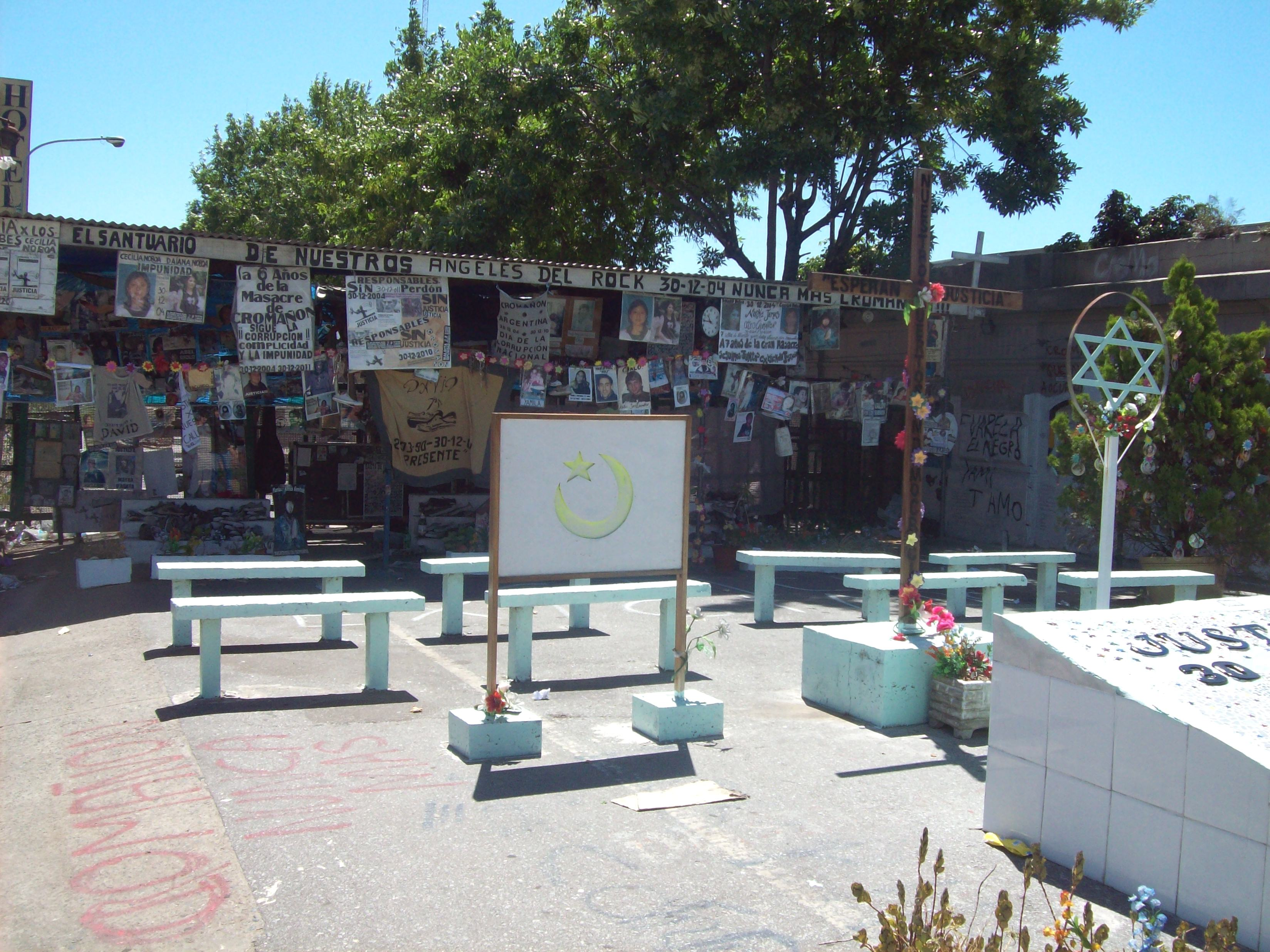 Improvisada plaza en memoria de los víctimas del siniestro en el local bailable de República Cromañón.